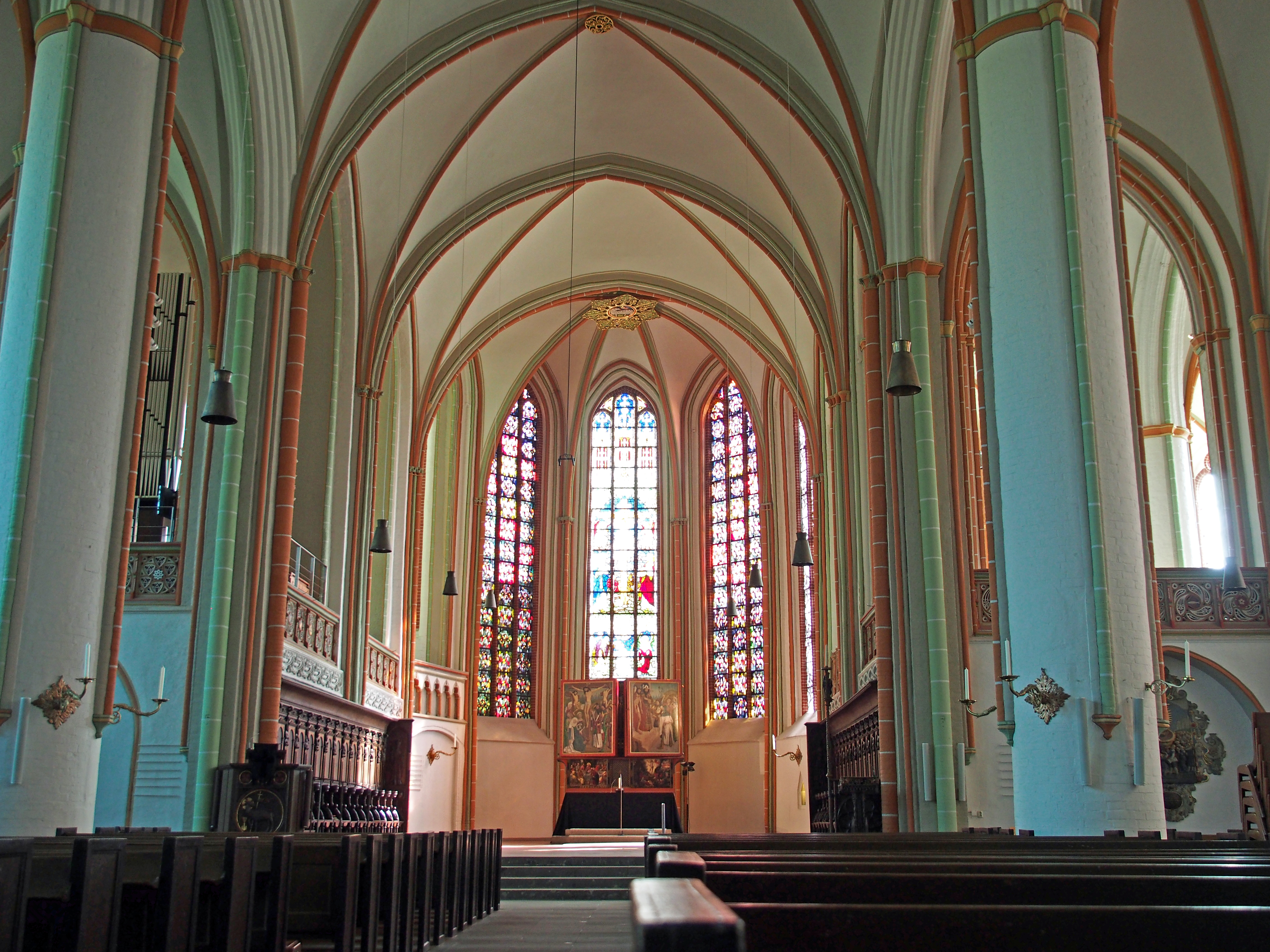 Langhaus und Altar St. Johannis, Lüneburg